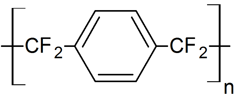 Фторзамещённый в метленовой группе поли-п-ксилилен